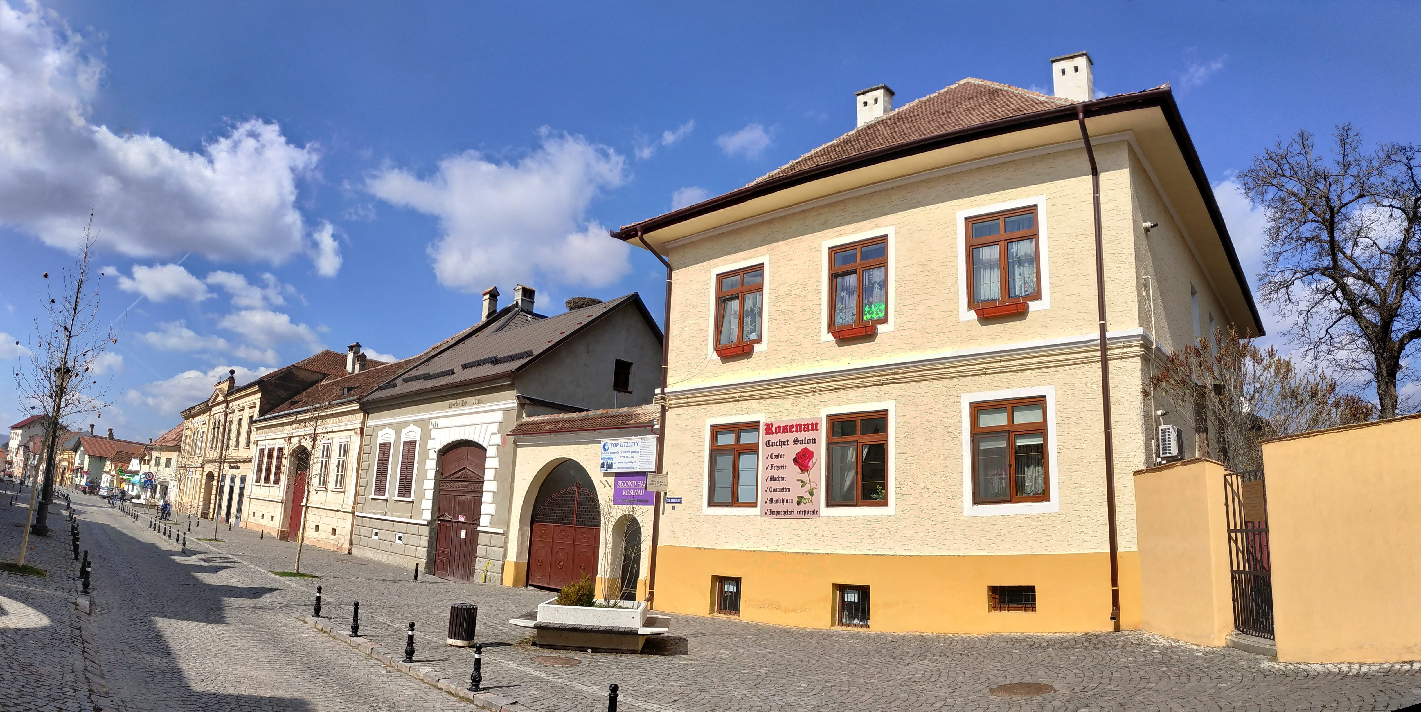 Str. Republicii, Râșnov, România